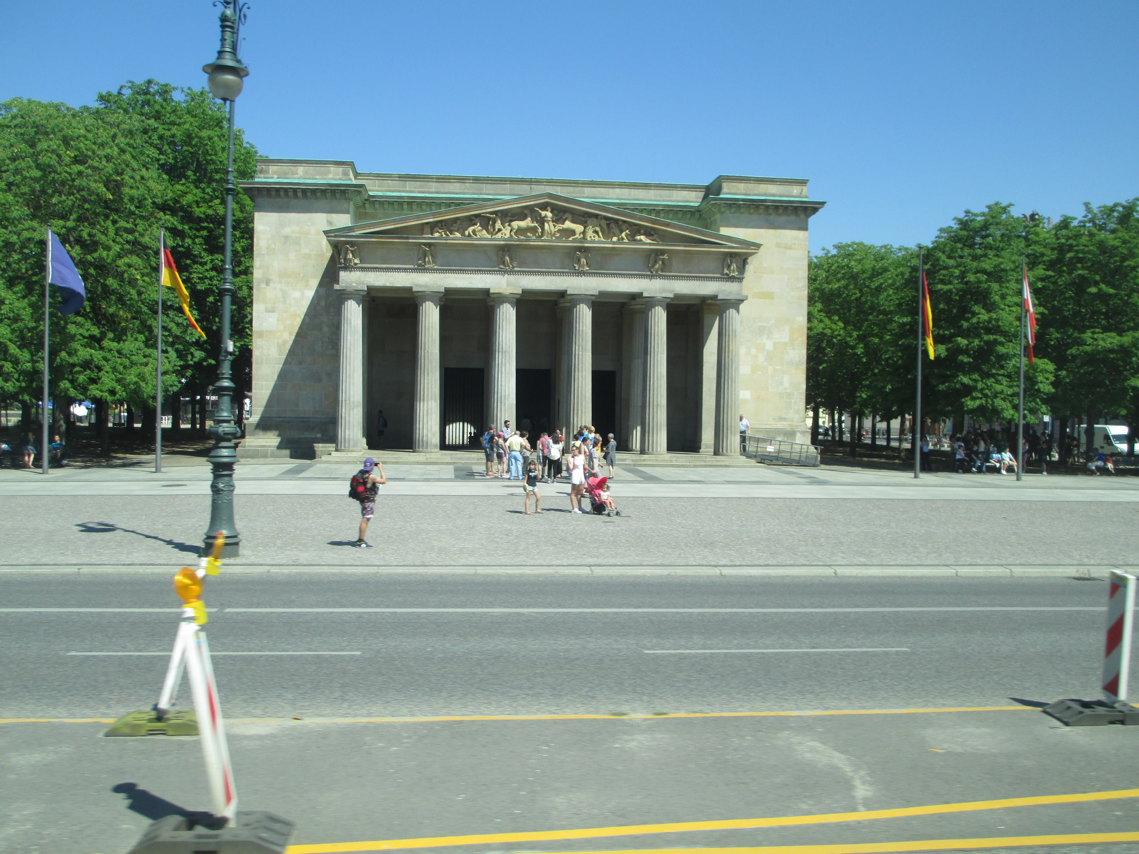 בית המשמר החדש בברלין